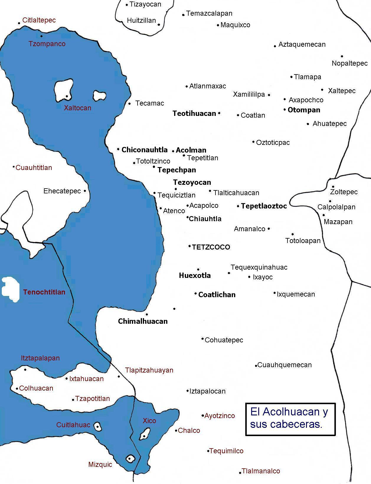 Ubicación de las principales poblaciones en la región de Texcoco, por tamaño no aparecen las 14 cabeceras, las que sí están aparecen en negritas. Con Color marrón aparecen otras poblaciones.